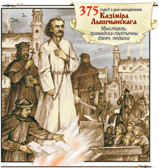 Художественный конверт с оригинальной маркой «375 лет со дня рождения Казимира Лыщинского», подготовленный ИЦ «Марка» РУП «Белпочта». Иллюстрация - 375 лет со дня рождения Казимира Лыщинского. Мыслитель, общественно-политический деятель, педагог — на бел. языке, сцена казни К. Лыщинского. Художник - Микола Рыжий.